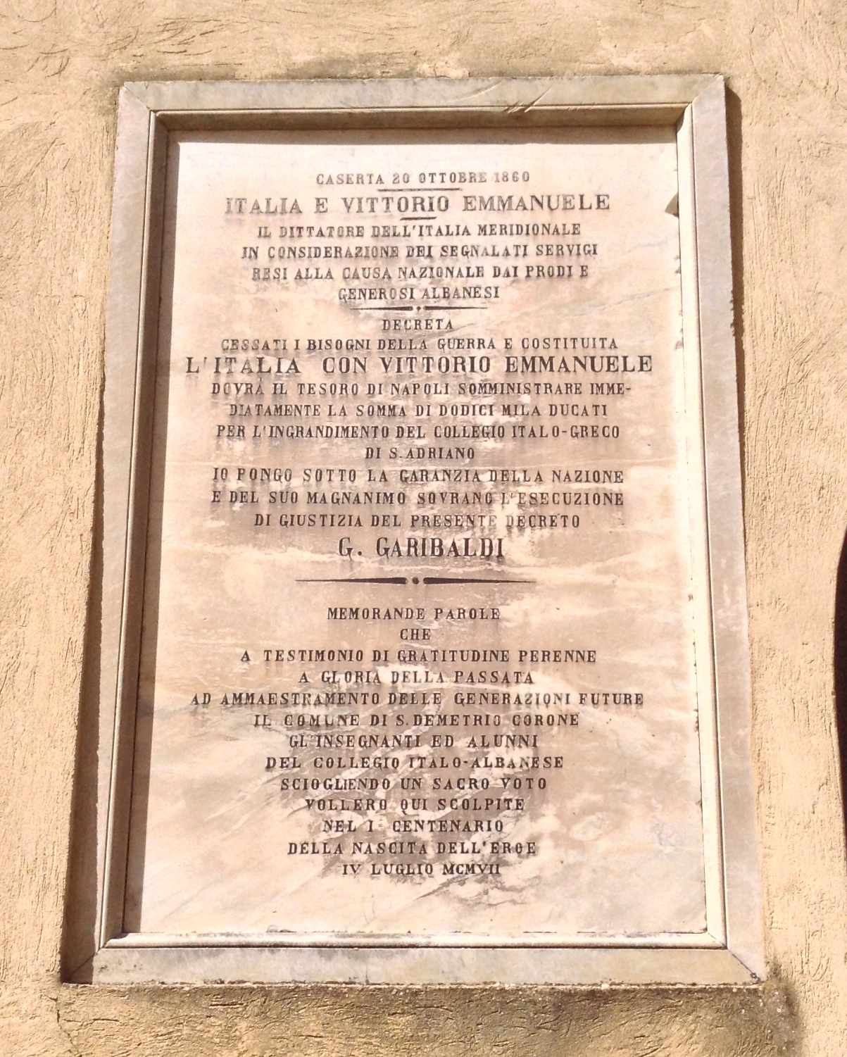 Dekret von Napoleon aus dem Jahr 1860